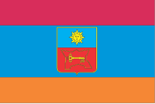 Прапор Бара